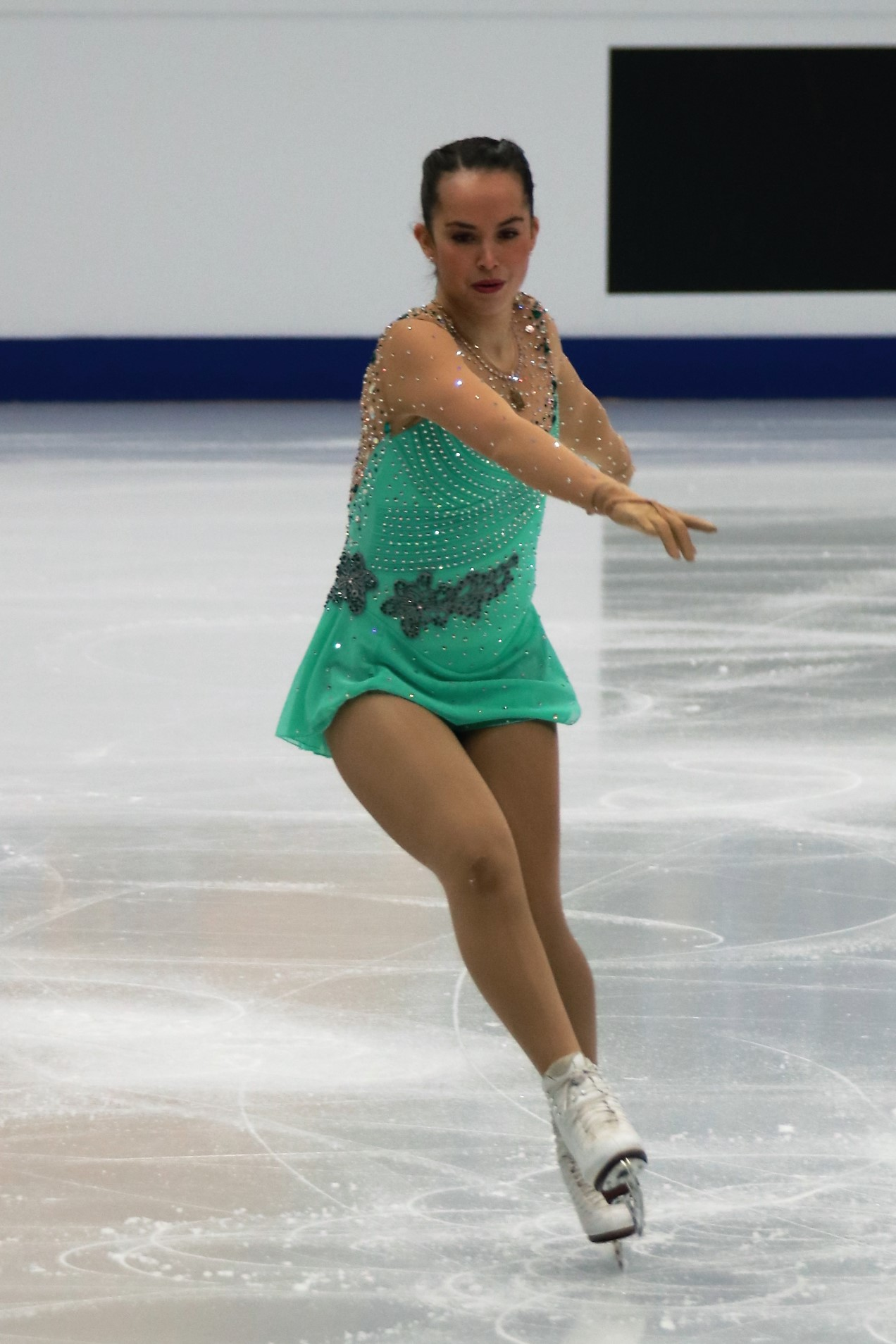 Эйми Бучанан (Израиль) на Чемпионате Европы по фигурному катанию 2018.